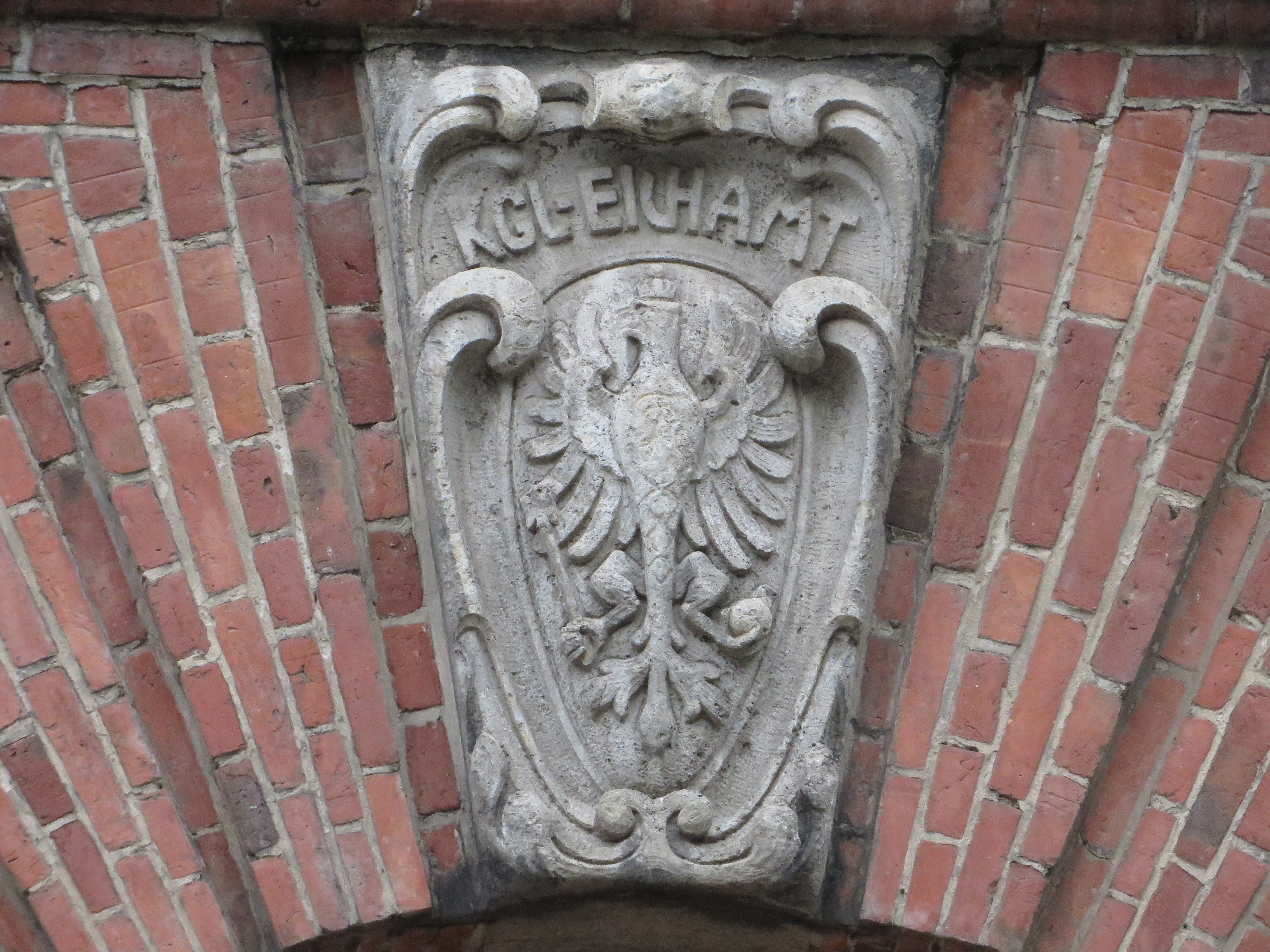 Tafel Kgl. Eichamt (Eichamt Flensburg), Bild 04